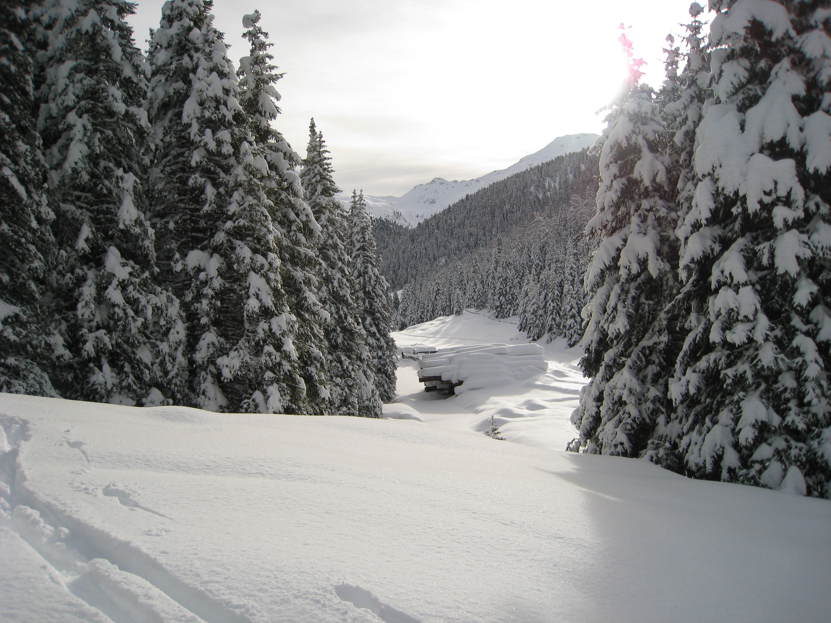 Neuschneelandschaft bei Durnholz im Sarntal